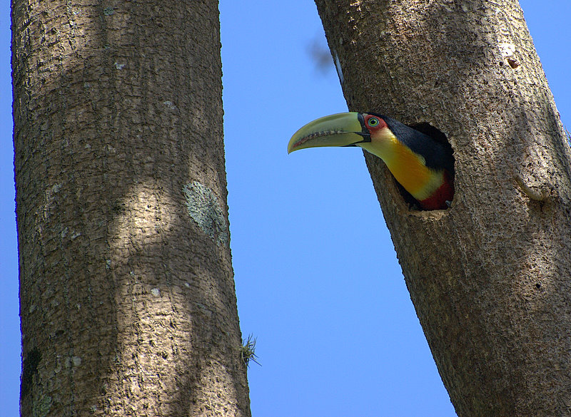 Jardim Botânico de São Paulo